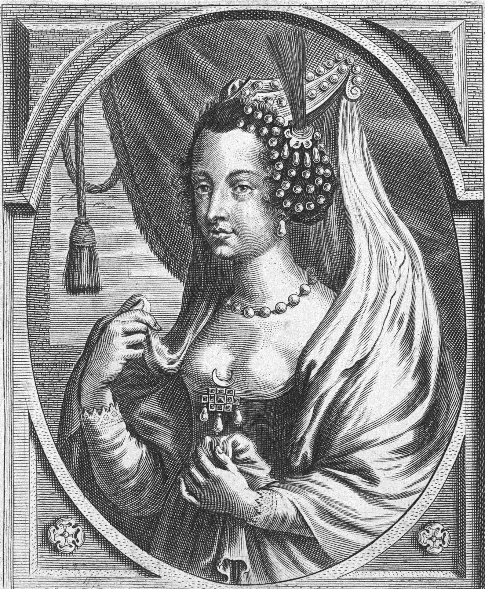 Turhan Hatice Sultan, matka Mehmed IV, konkubina Ibrahima I, w latach 1651-1683 pełnił funkcję Valide Sultan